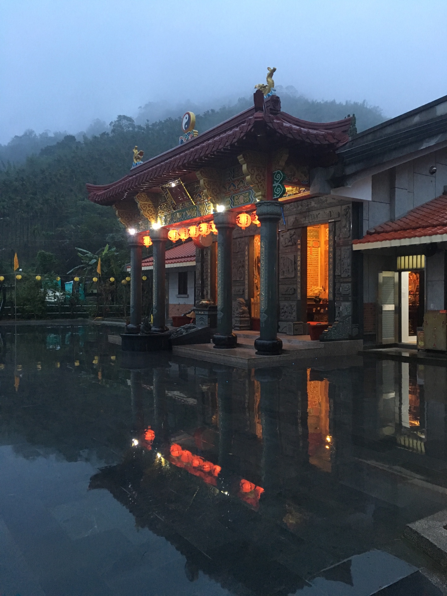 中文（台灣）: 矗立在雨後的木柵真北宮。